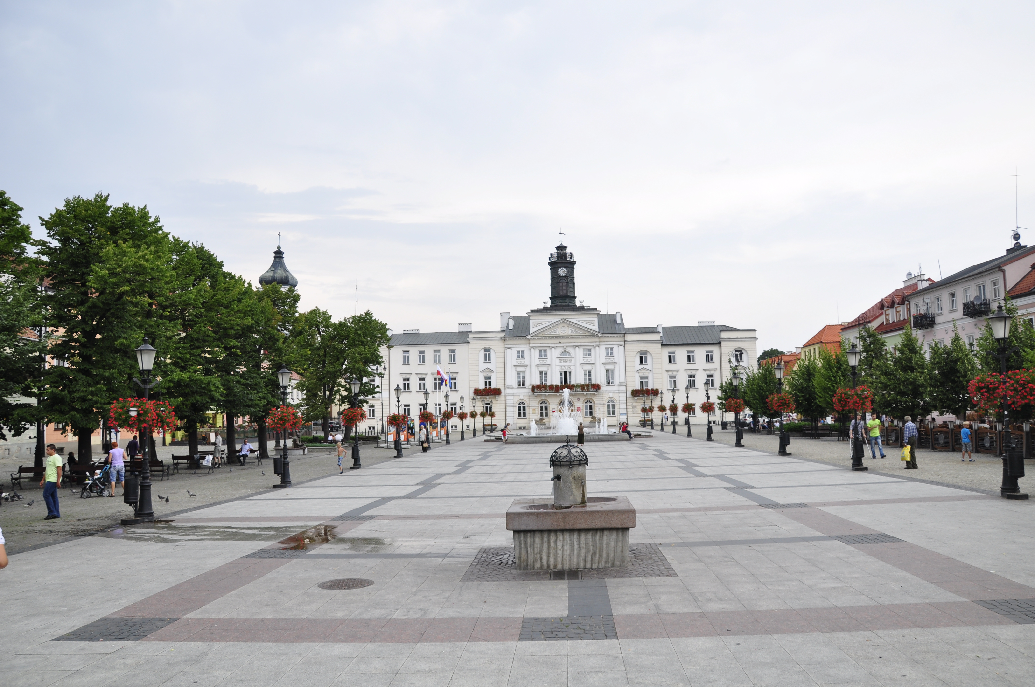 Plock